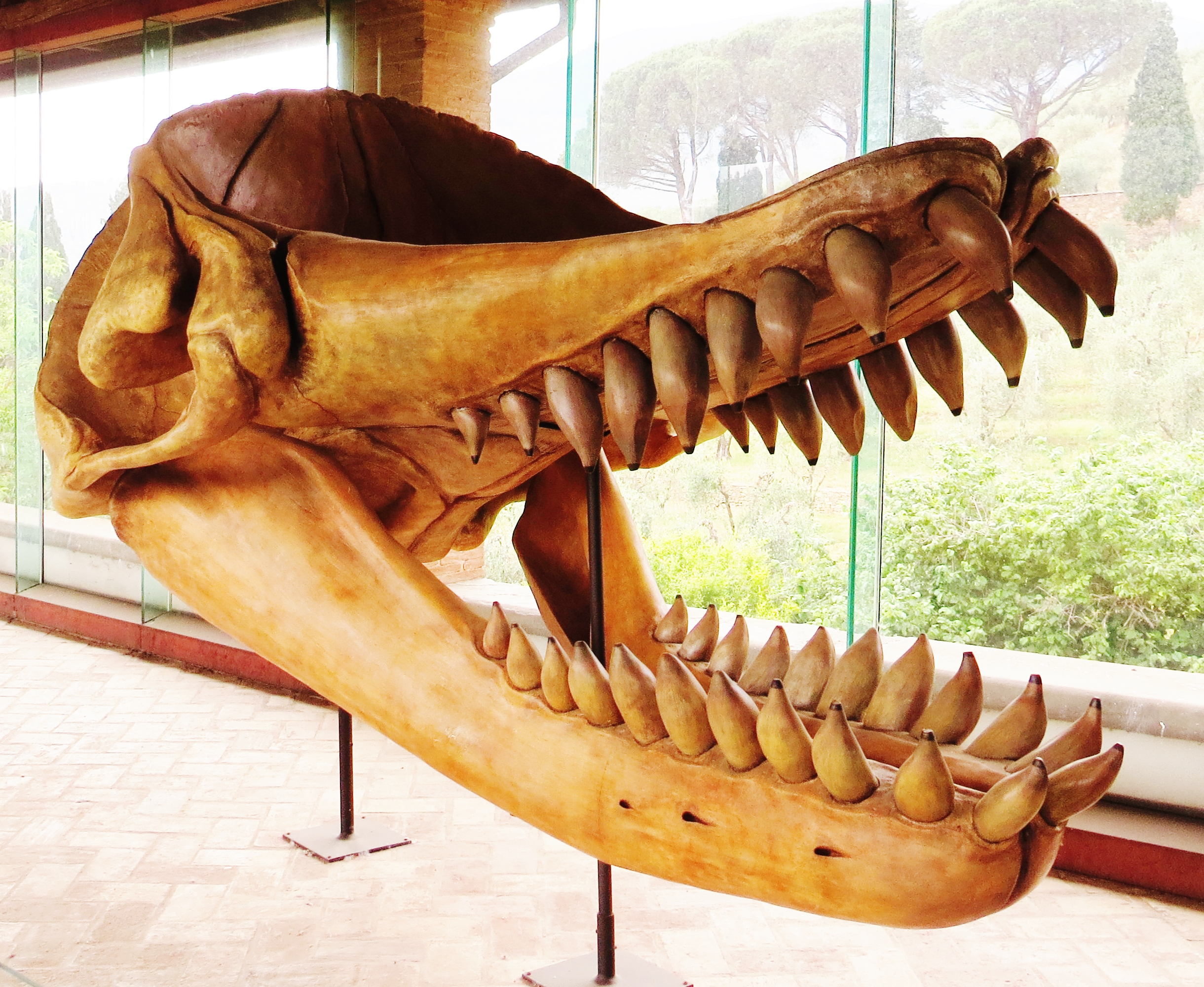 Fossil - Took the picture at Museo di Storia Naturale di Calci - Pisa